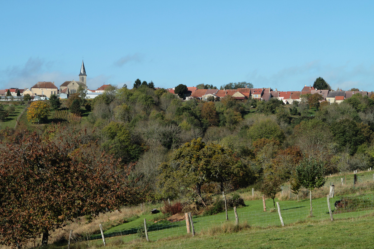 Vue générale de Varennes-sur-Amance